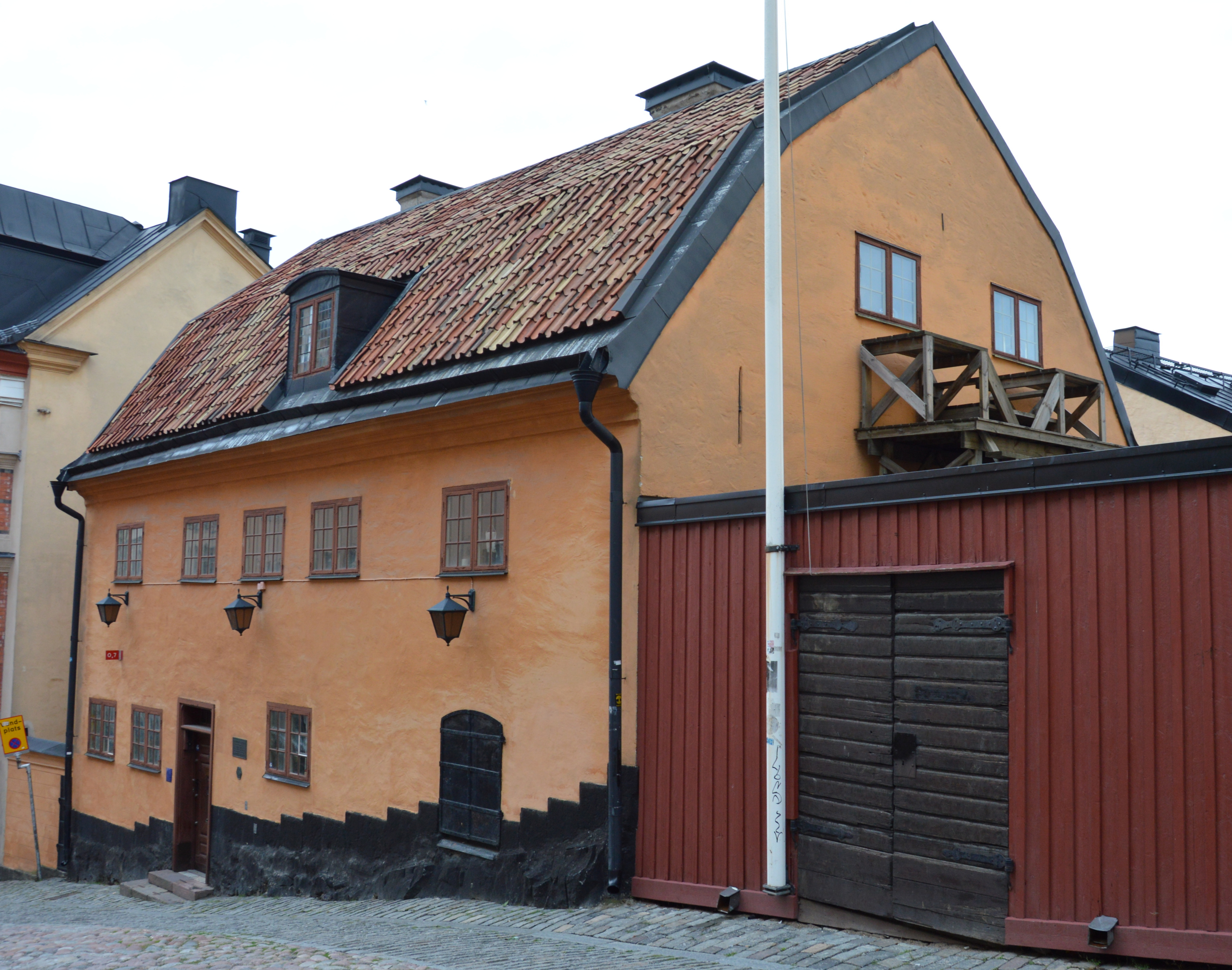 Bellmanhaus in Stockholm, Södermalm